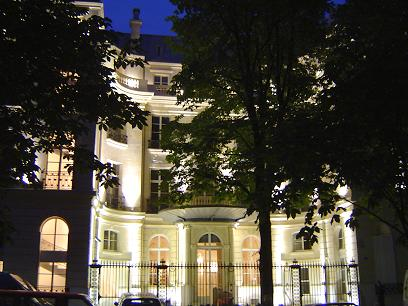 Vue nocturne de l'hôtel particulier acceuillant l'ambassade de la République tchèque à Paris, 15 avenue Charles-Floquet (XVème), construit par Pierre Humbert pour la princesse de La Rochefoucauld.